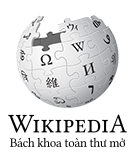 Wikipedia logo 2.0 (vi)